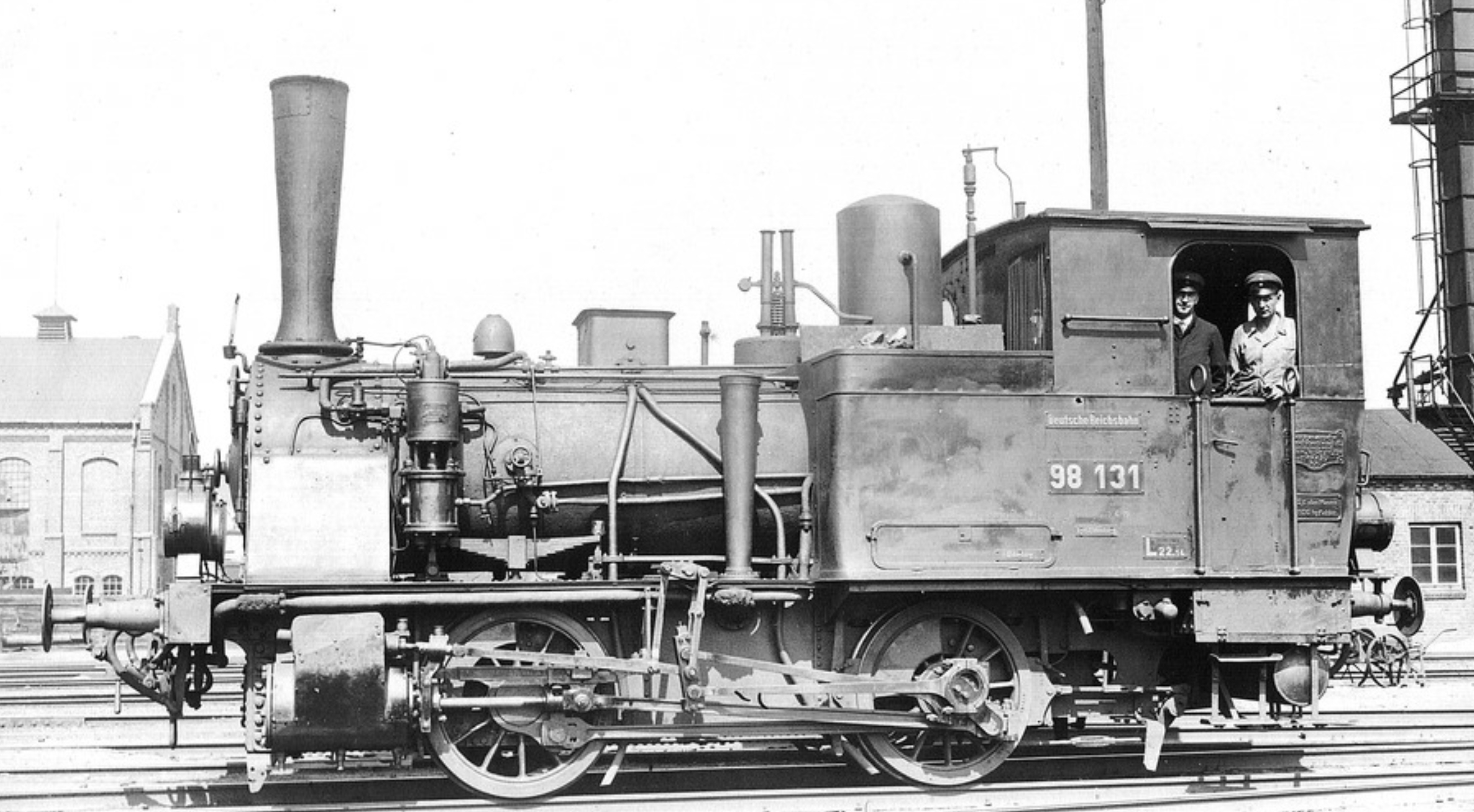 Tenderlokomotive der BR 98.1 (vormals Oldenburgische T 2) im Bahnbetriebswerk Oldenburg